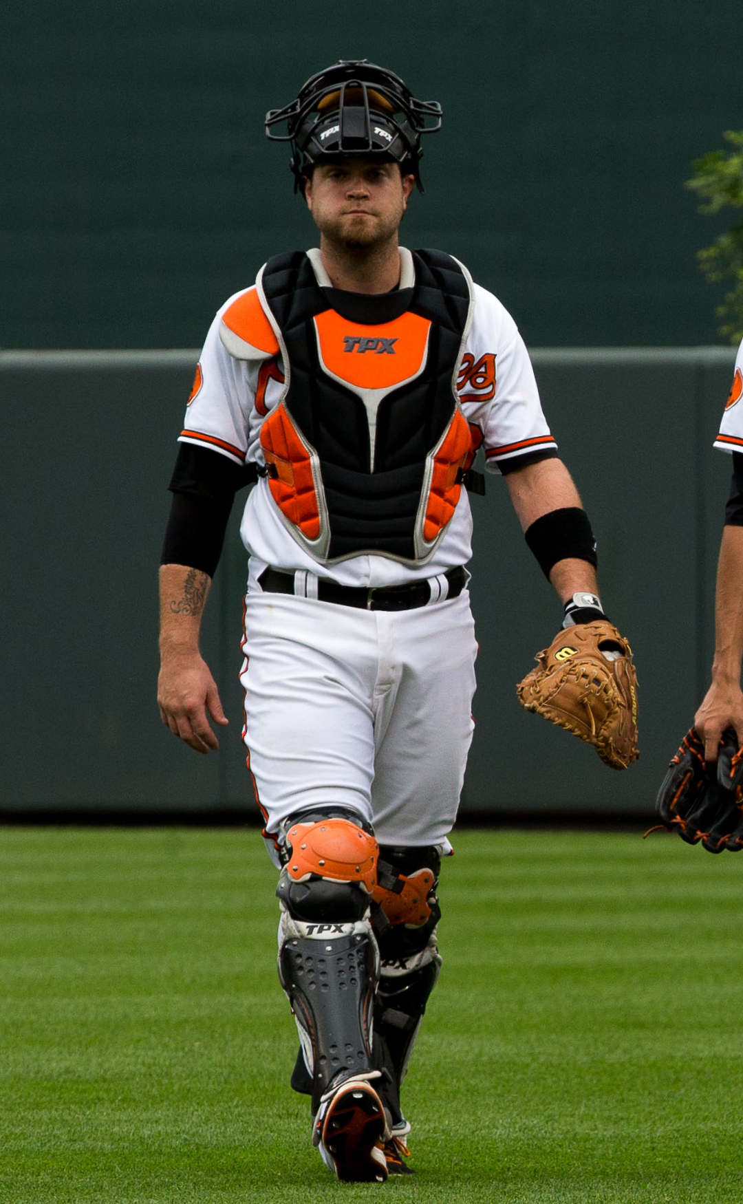 Chris Snyder